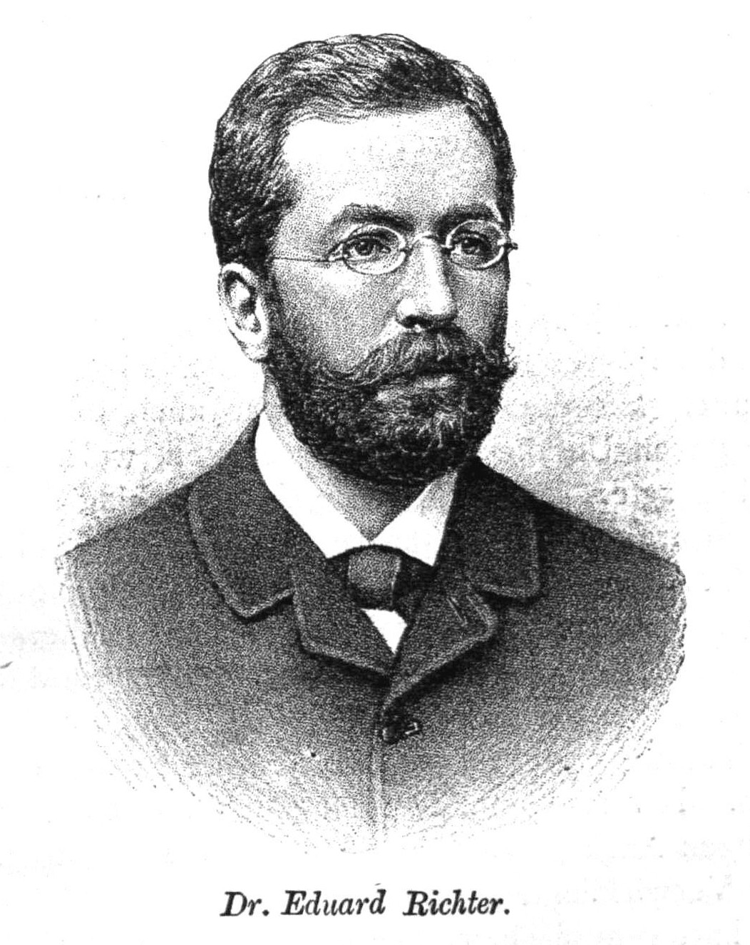 Dr. Eduard Richter aus Zeitschrift des Deutschen und Oesterreichischen Alpenvereins 1894 Band 25